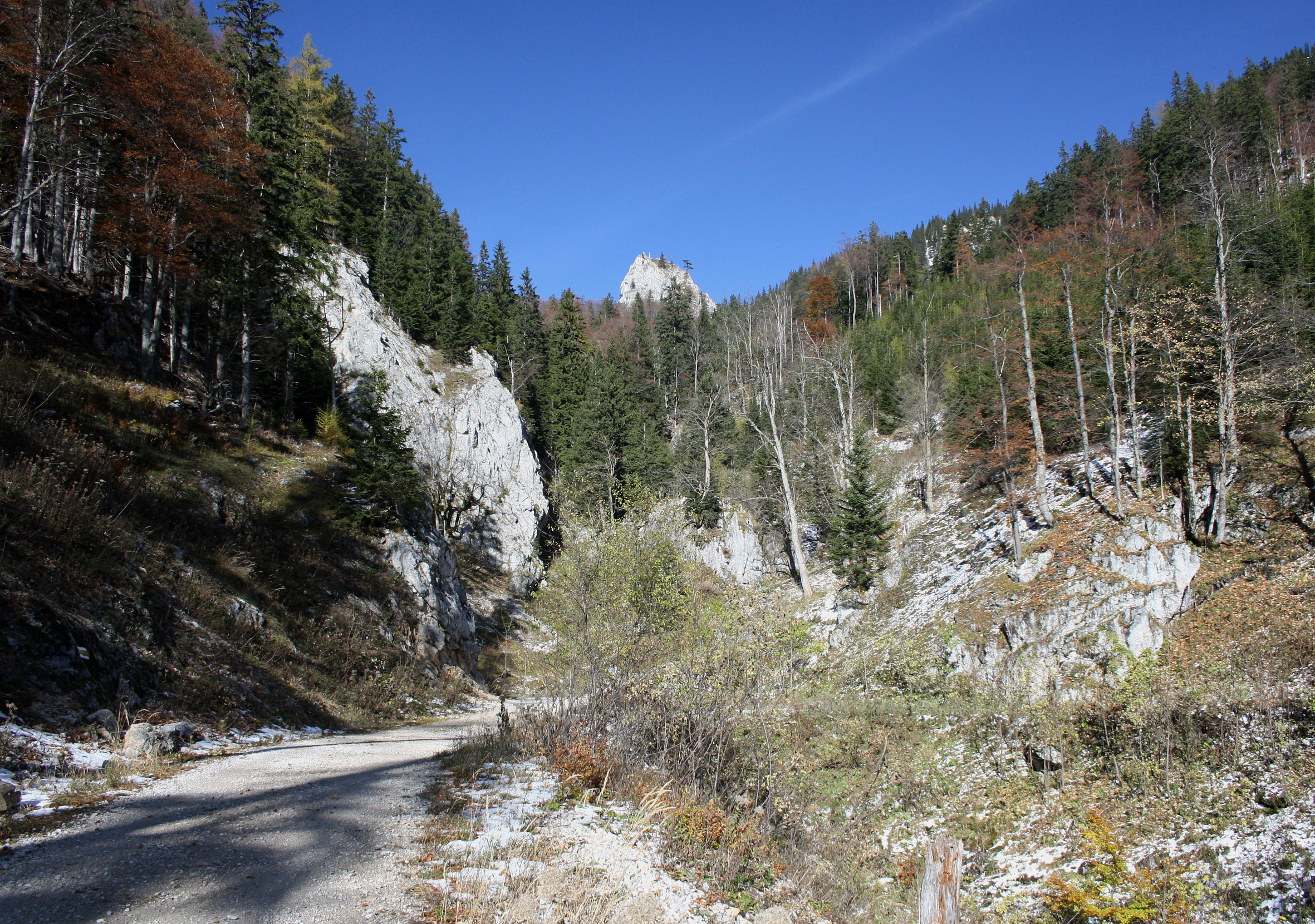 Der Talschluss des Weichtals. Im Hintergrund der Turmstein.